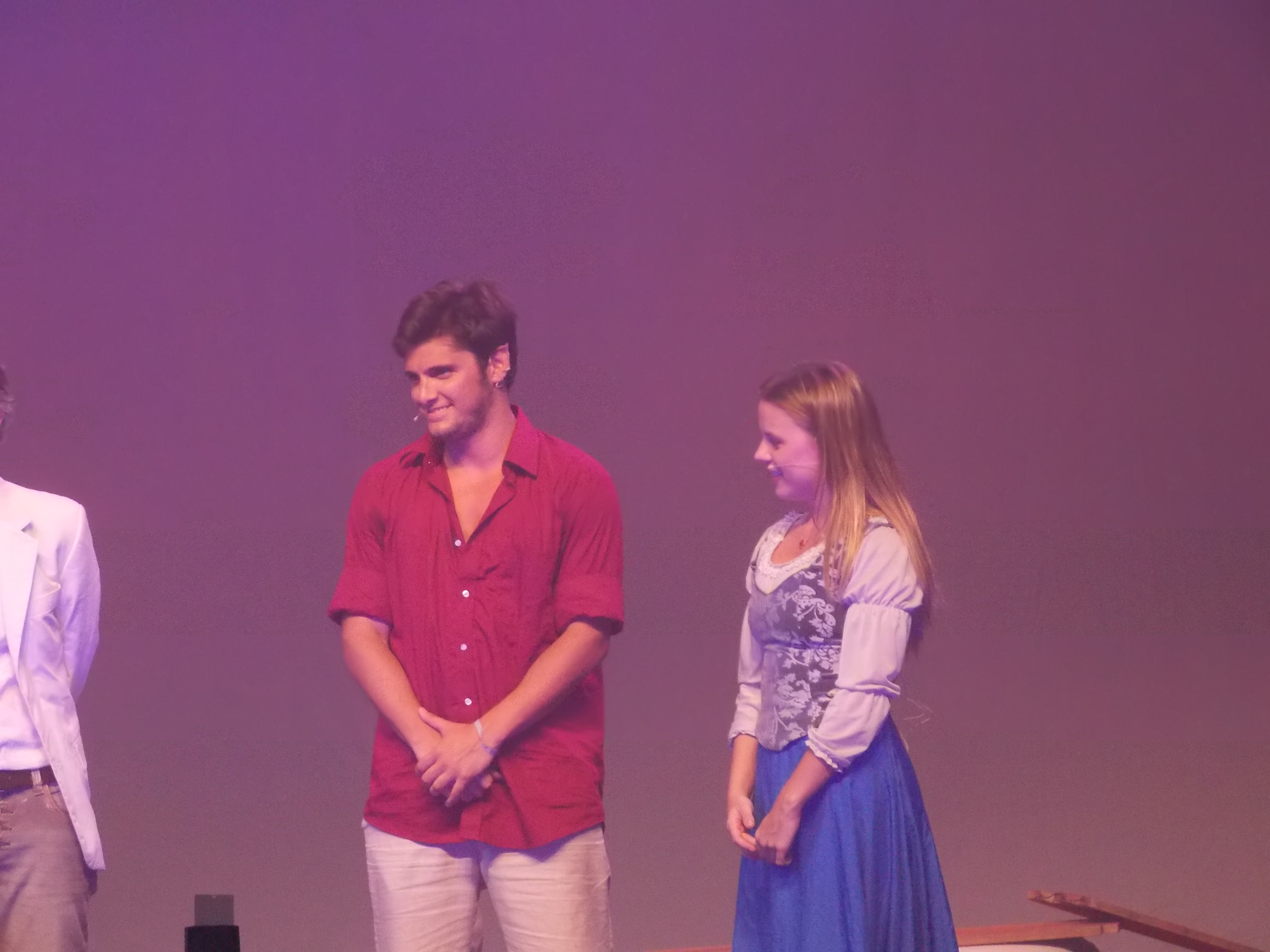 Evento: Festa Internacional de Teatro de Angra. Peça: Romeu na Roda. Elenco: Bruno Gissoni, Daniela Carvalho, Rafael Zulu, Marcos Breda, Rodrigo Simas, Felipe Simas e Beto Simas (Mestre Boneco).